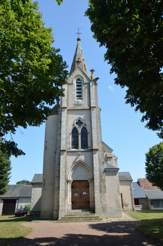 Thizay - Eglise Notre-Dame